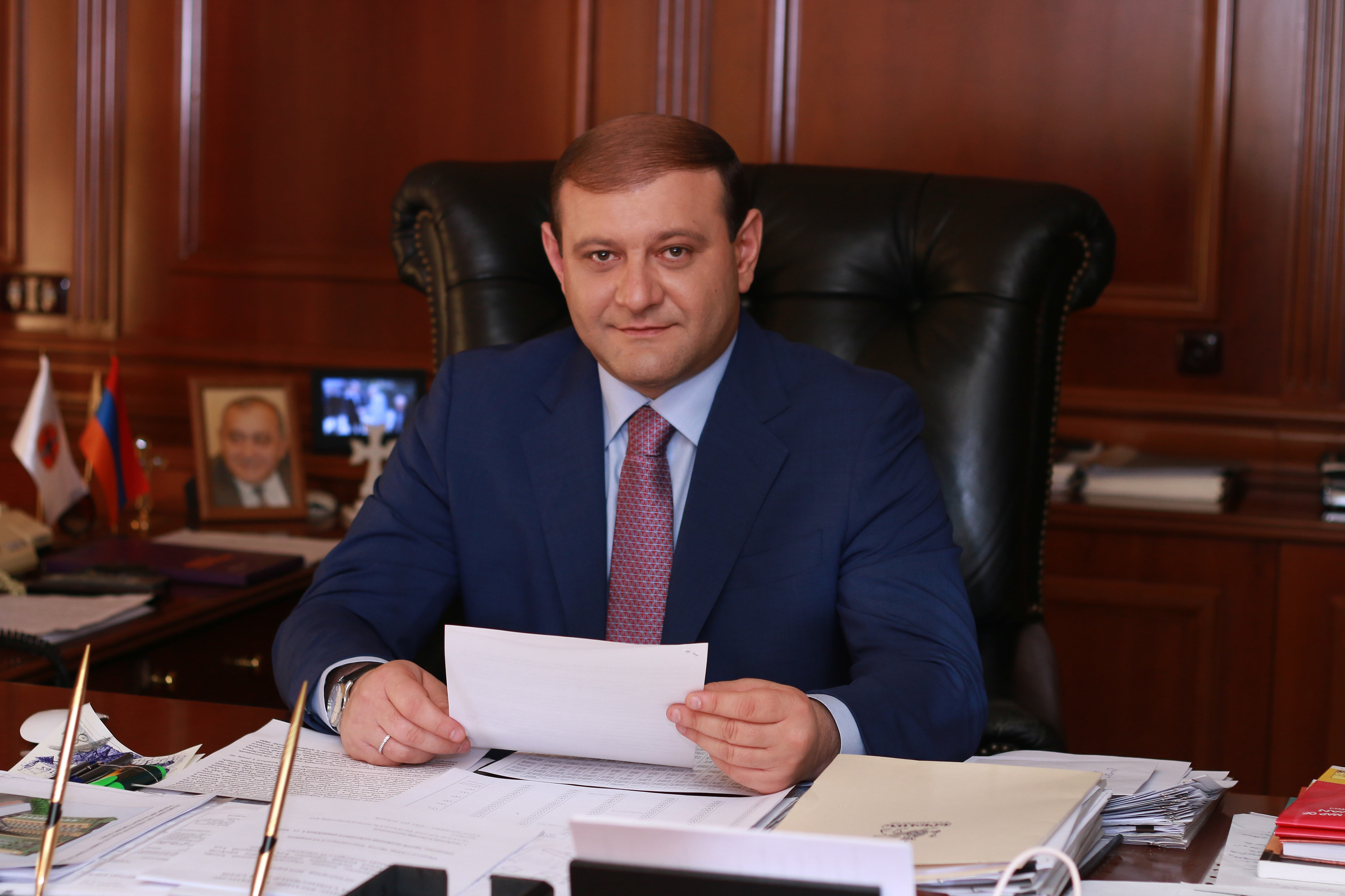 Տարոն Մարգարյան